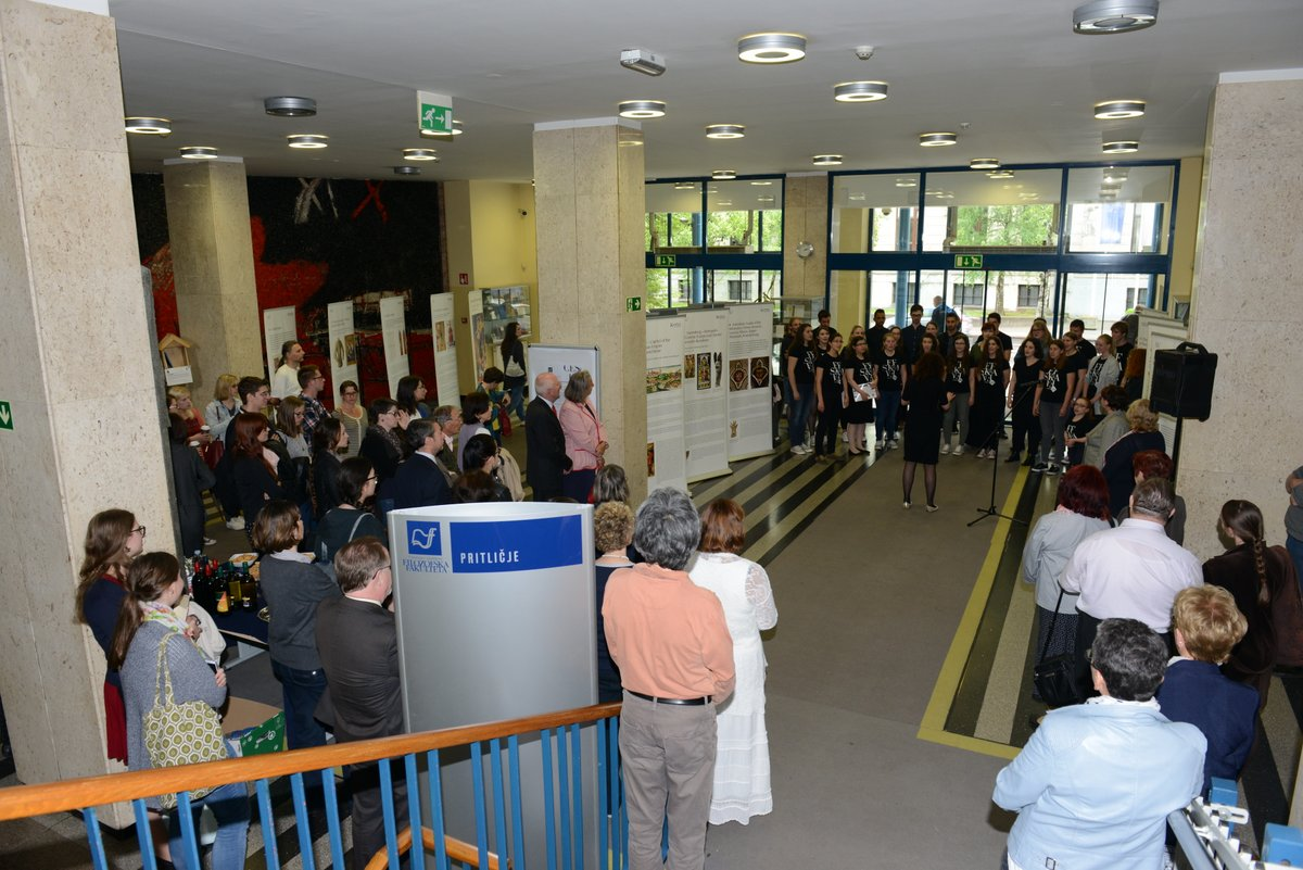 Otvoritev razstave